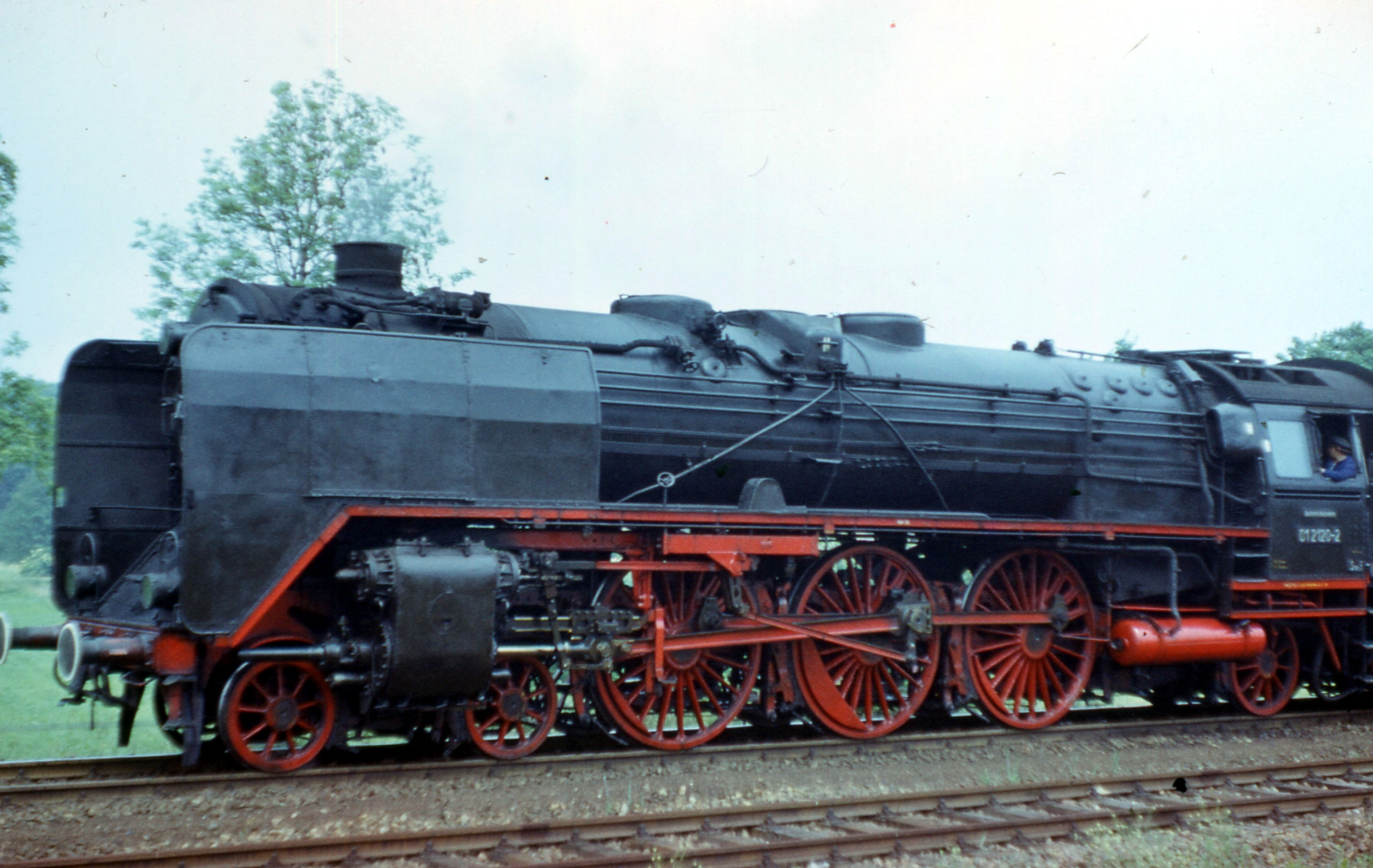 Dampflokomotive der Baureihe 01 der Deutschen Reichsbahn mit Eisenbahnsonderfahrt Dresden-Riesa-Flöha.